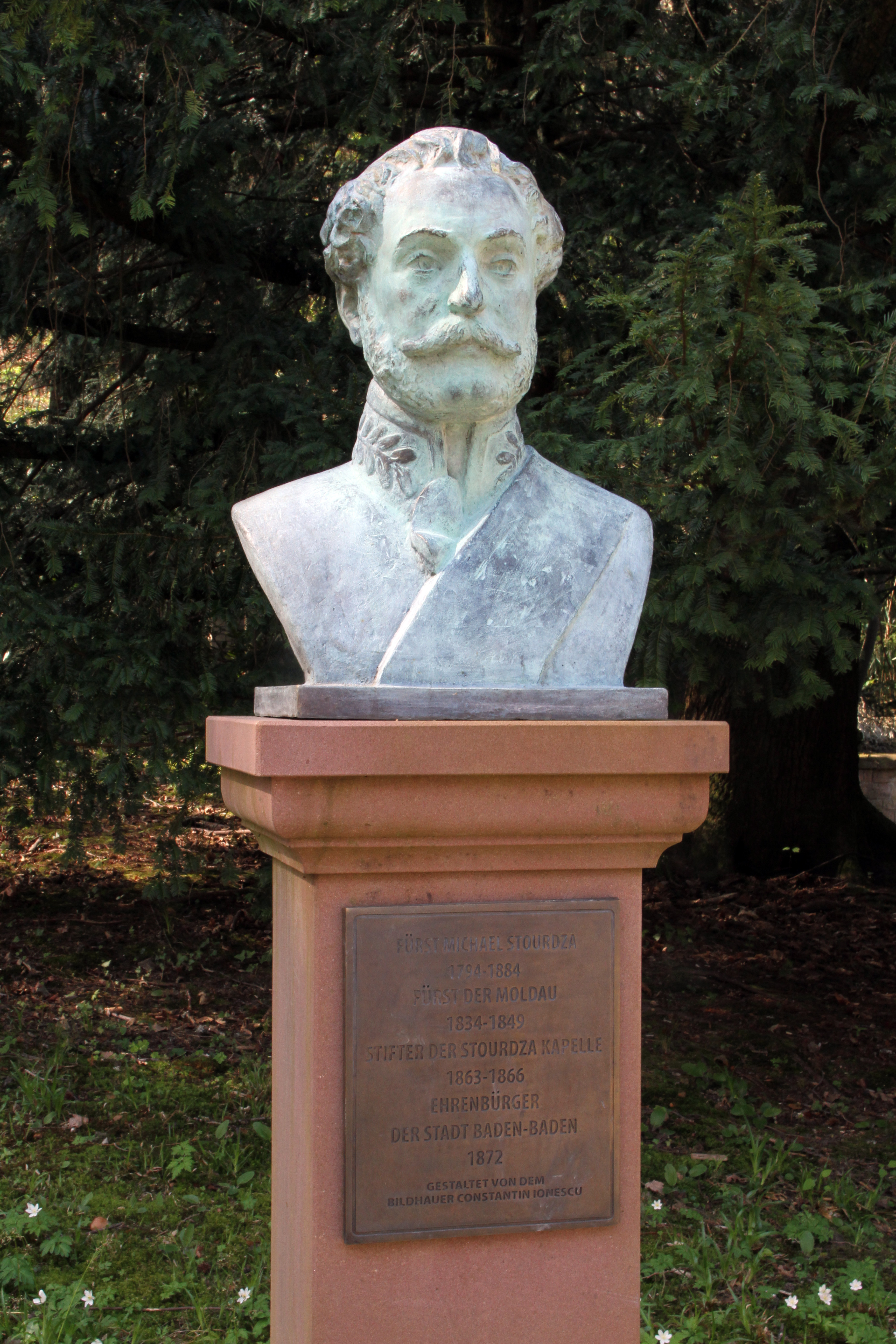 Bildnis von Michael Stourdza bei der rumänisch-orthodoxen Stourdza-Kapelle auf dem Michaelsberg in Baden-Baden.